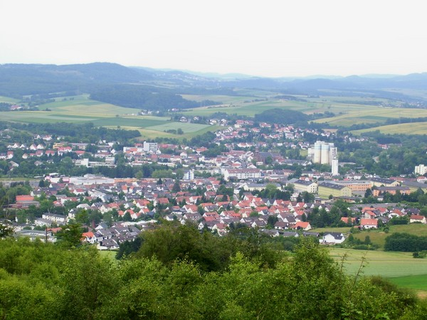 Ausblick über Lebach